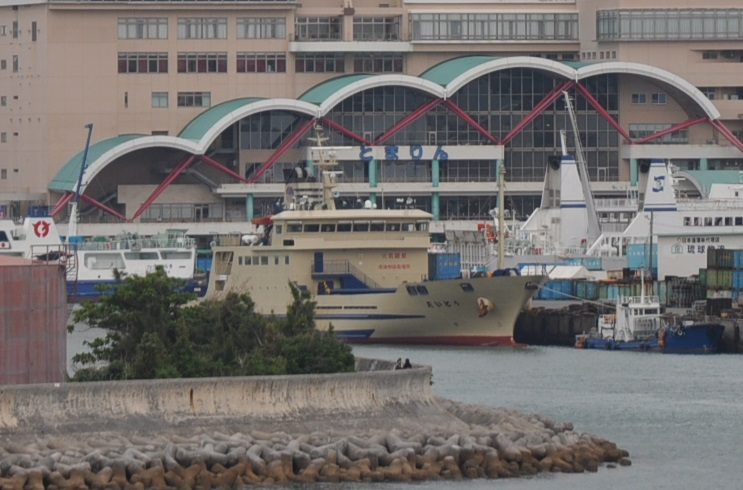 泊埠頭に停泊する大東海運「だいとう」（２代）